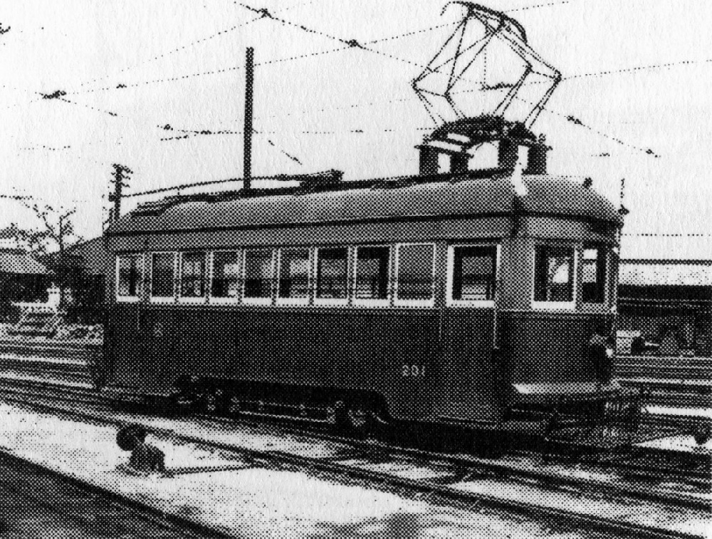 1940年ごろに撮影された広島瓦斯電軌（広島電鉄）の200形電車201号。